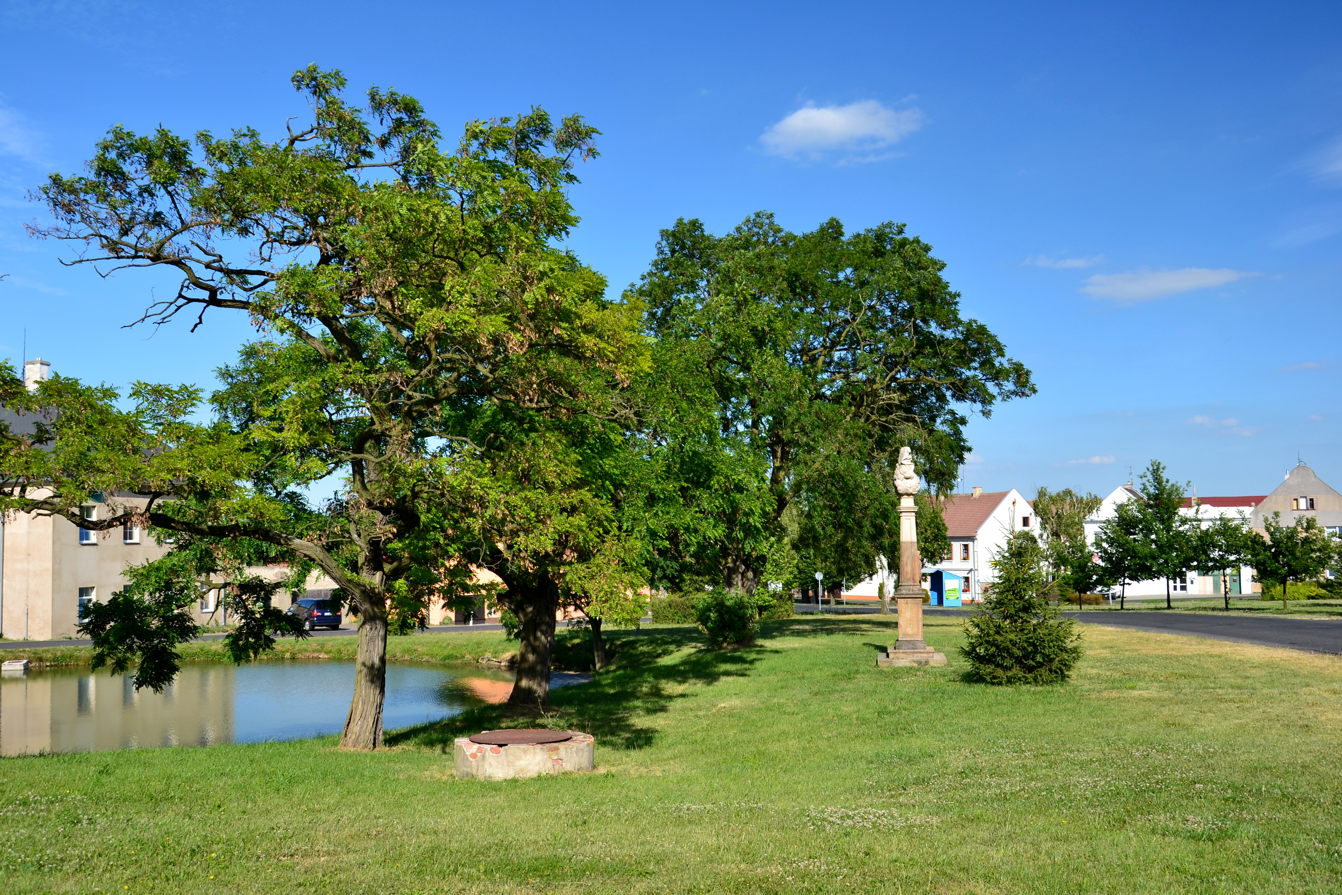 Náves